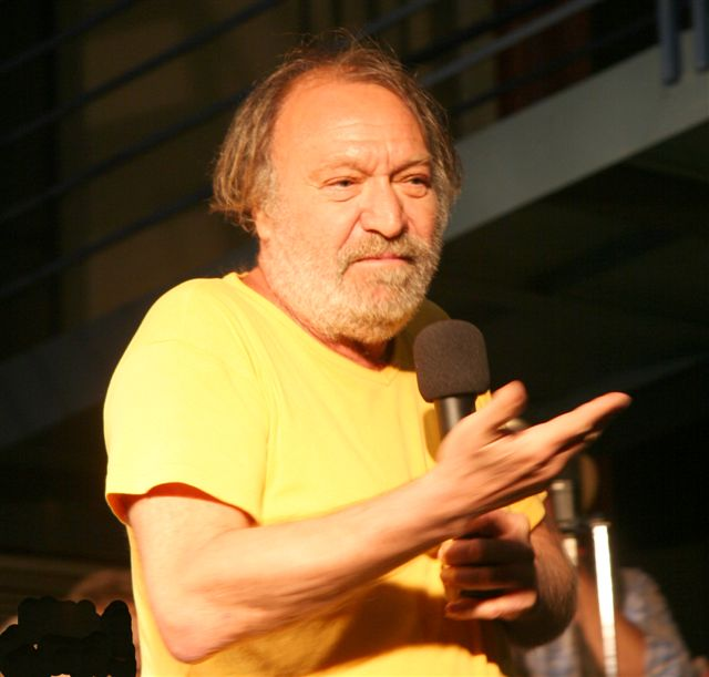 Carlo Monni during a show in Campi Bisenzio, Teatro Dante